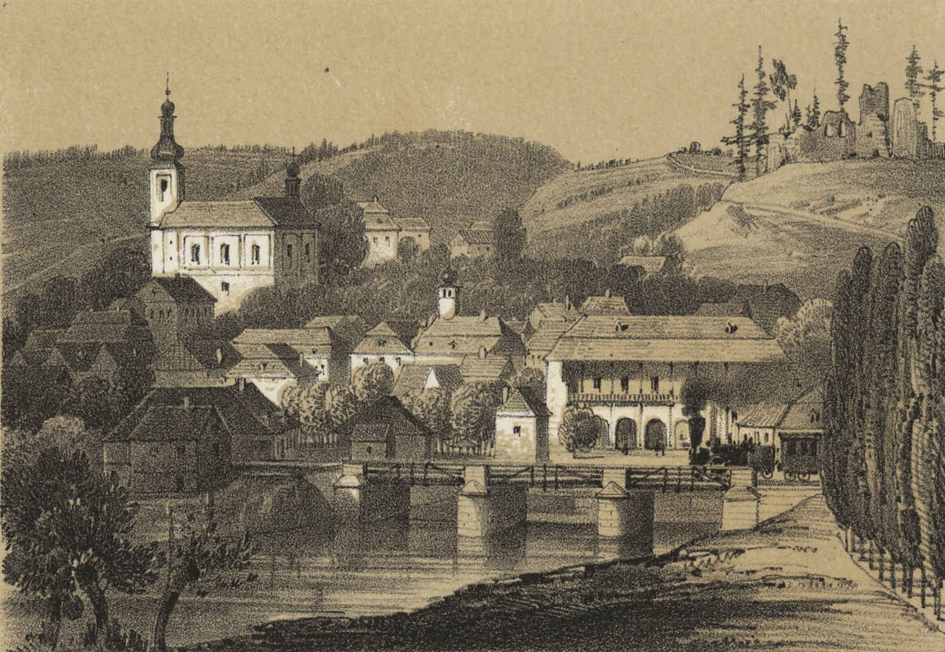 Brandeis